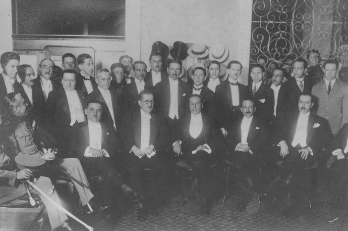 El presidente de la República del Ecuador, Isidro Ayora Cueva, alrededor de 1930.